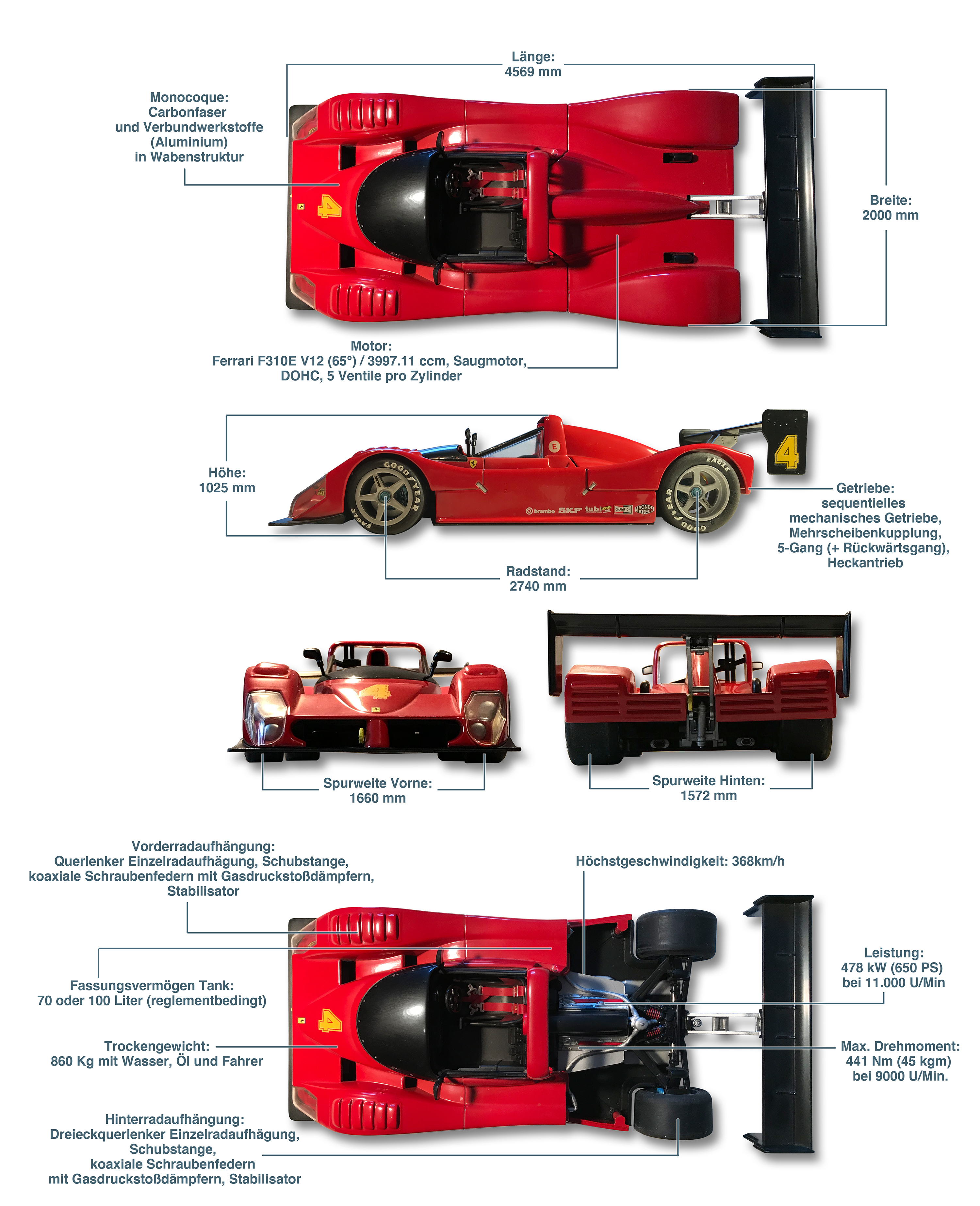 Grafisch aufbereitete Basis-Informationen zum Ferrari 333SP anhand eines 1:18 Scale-Modells